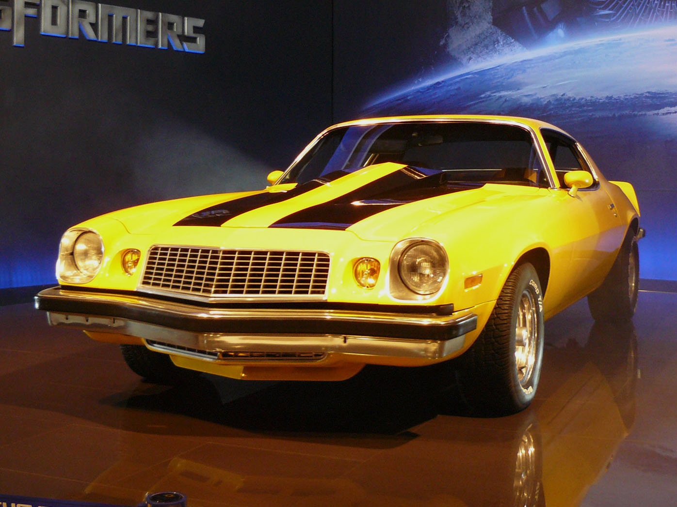 Chevrolet Camaro en Transformers (2007)